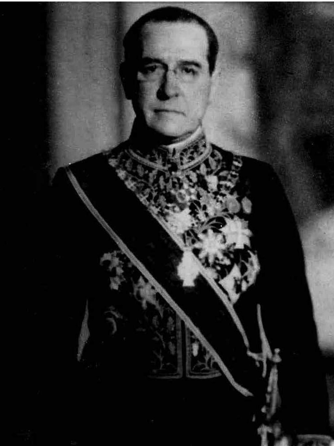 Eduardo Labougle durante su segundo período en Alemania (1932-1939), el primero como embajador. Departamento Documentos Fotográficos. Inventario 25089